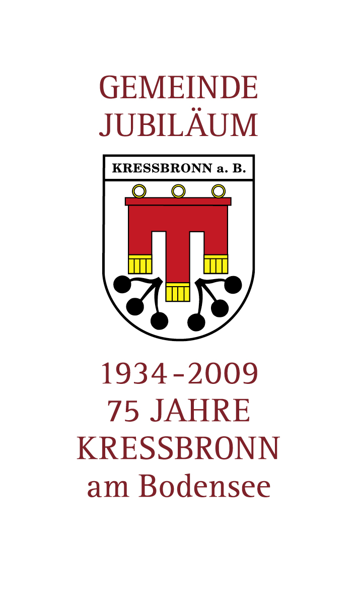 Jubiläumswappen "75 Jahre Kressbronn"